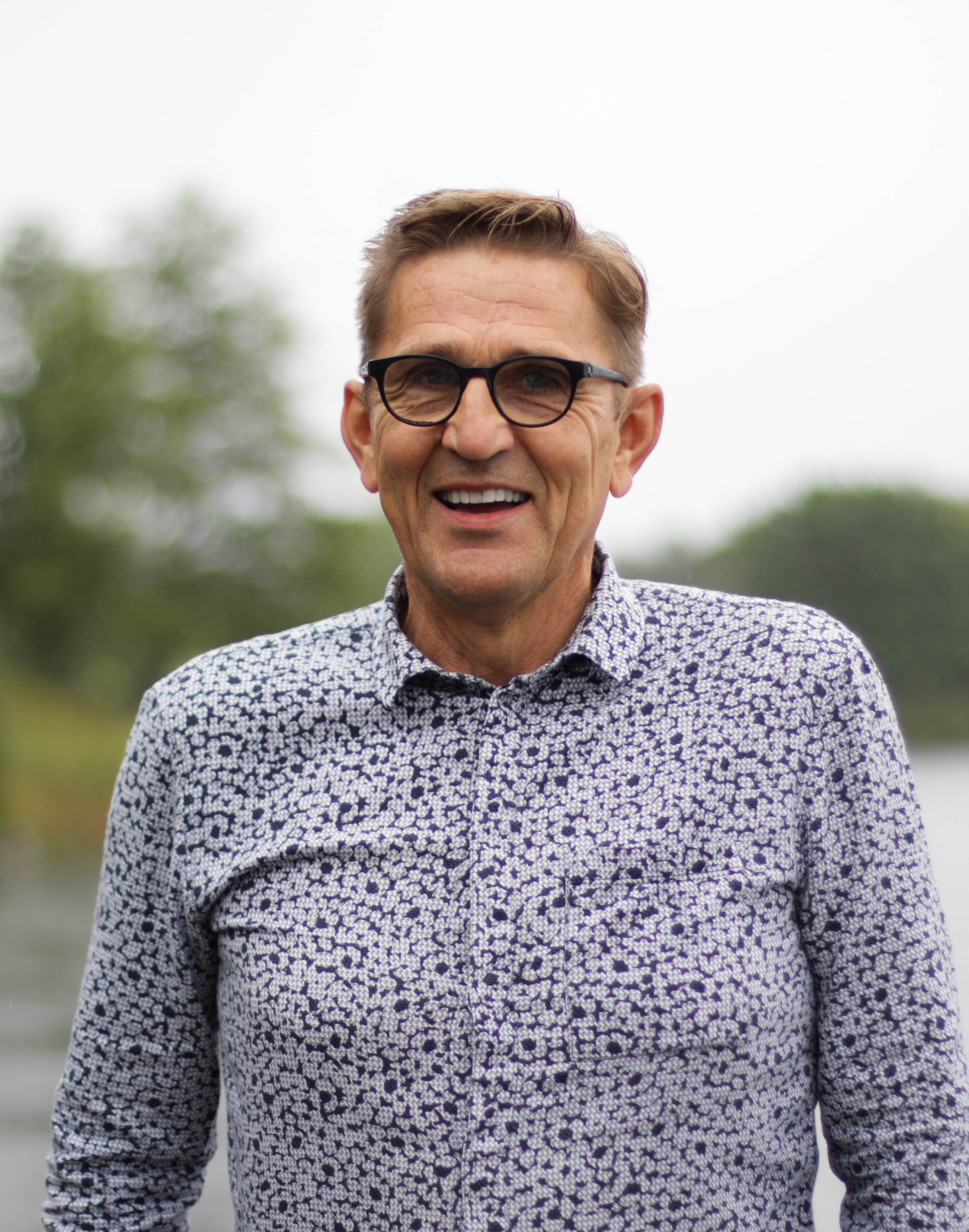 Foto: Kalle Lundin